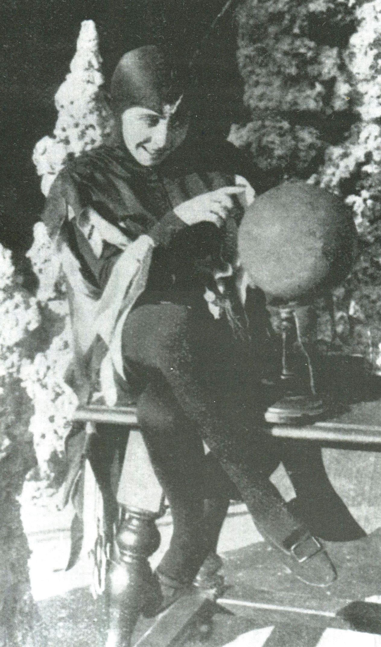 Gigetta Morano in Preferisco l'inferno 1916 - regia di Eleuterio Rodolfi -produz "Ambrosio Film", Torino